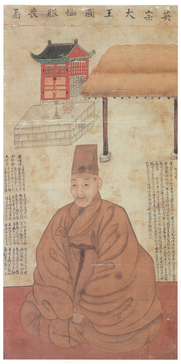 영조 국상중 상복을 입은 조선의 양반